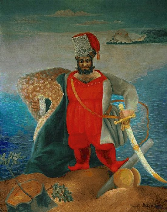 "Стенька Разин", картина Григория Алексеевича Мусатова. Национальная галерея, Прага